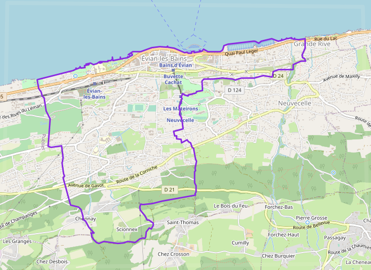 carte réalisée sur umap This map may be incomplete, and may contain errors. Don't rely solely on it for navigation.